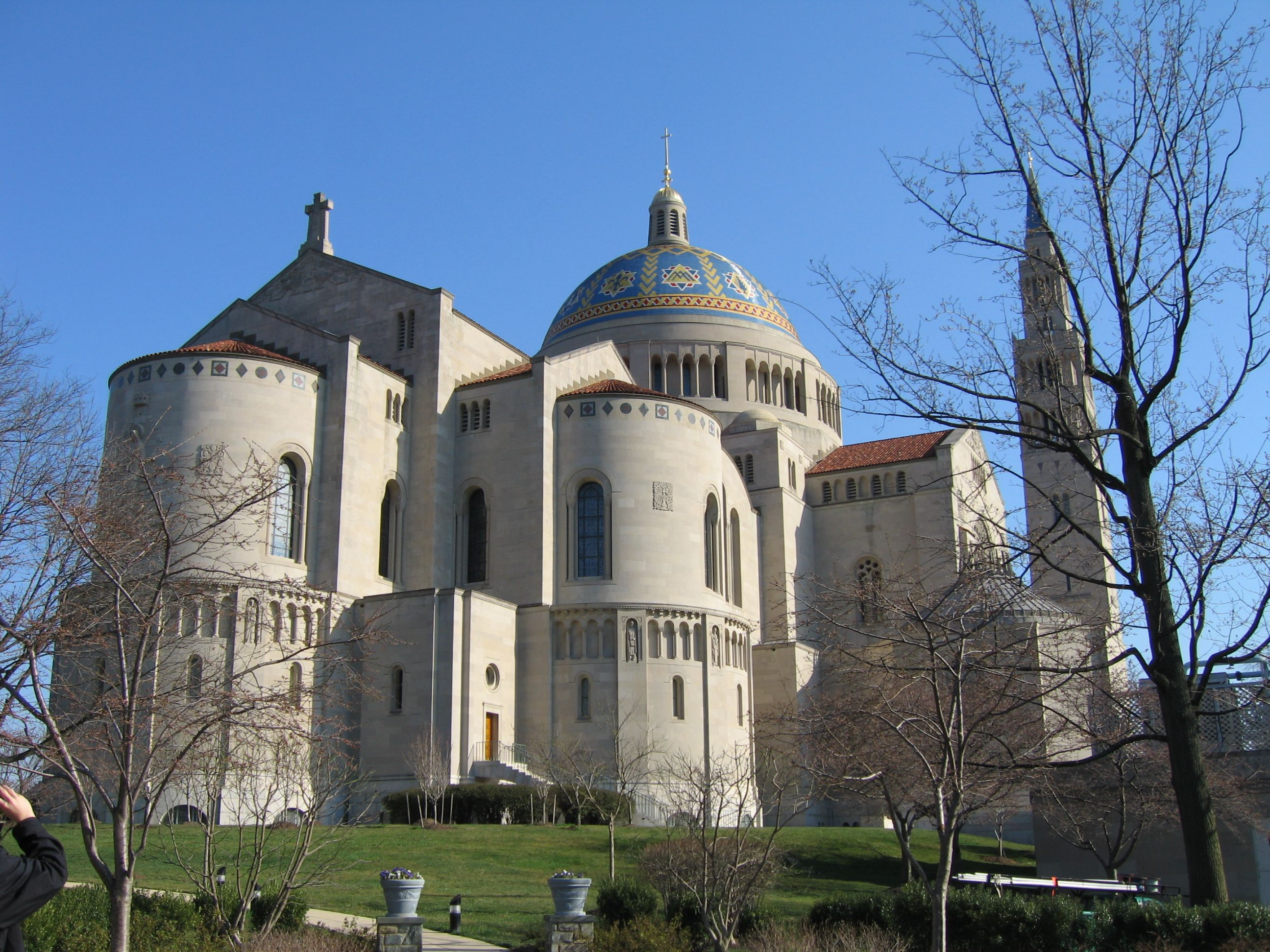 Photographie de la Basilique du Sanctuaire National de l'Immaculée Conception (Basilica of the National Shrine of the Immaculate Conception), à Washington D.C. Construite entre 1920 et 1959